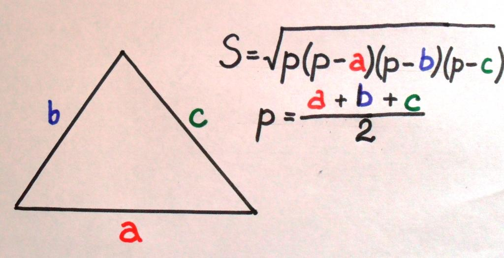 Беларуская (тарашкевіца): Формула Герона